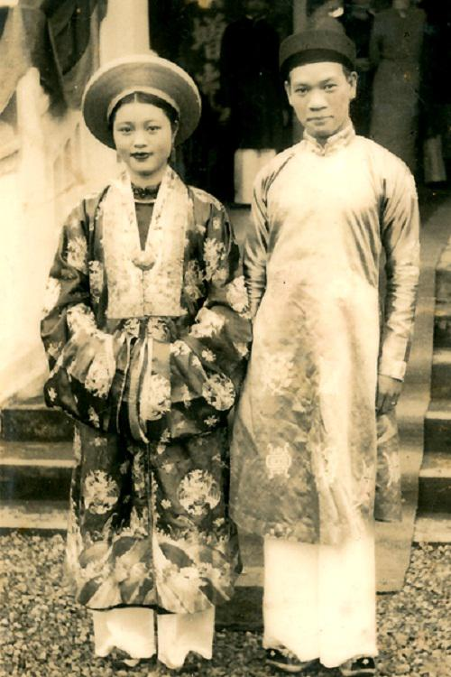 Cố bộ trưởng bộ Giáo dục Nguyễn Văn Huyên và vợ là bà Vi Kim Ngọc trong đám cưới, năm 1936. Ông mặc áo dài và mặc áo nhật bình truyền thống.